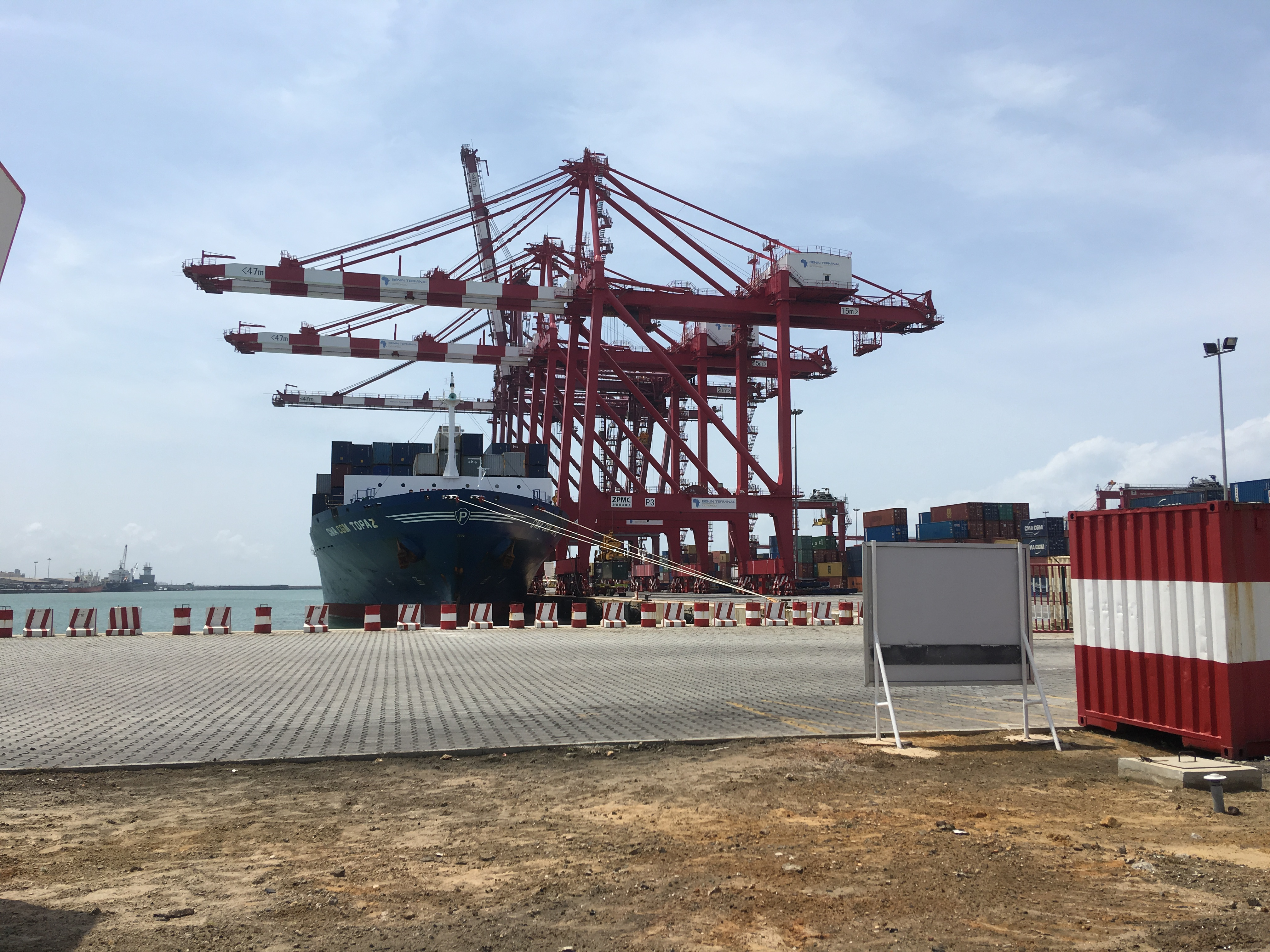 Portiques déchargeant un bateau à quai au port autonome de Cotonou